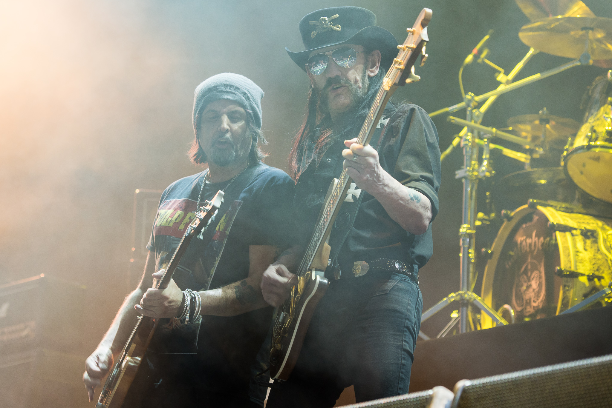 ARGO-Konzerte,Beck's Park Stage,Festival,Ian Fraser „Lemmy“ Kilmister,Konzert,Lemmy Kilmister,Livekonzert,Livemusik,Motörhead,Musik,Phil Campbell,Philip Anthony „Wizzö“ Campbell,RiP,Rock im Park 2015